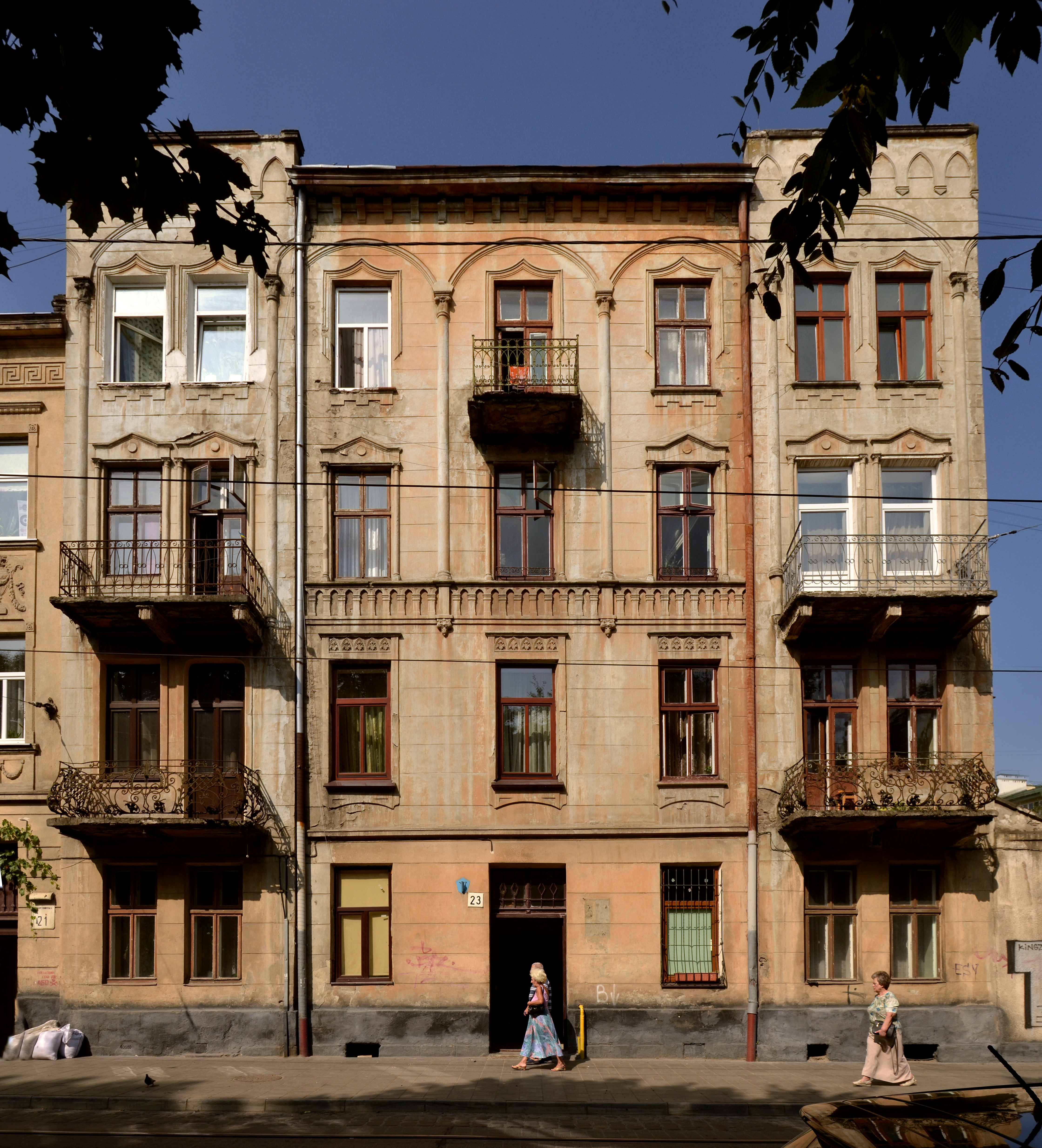 Будинок № 23 на вулиці Замарстинівській у Львові.